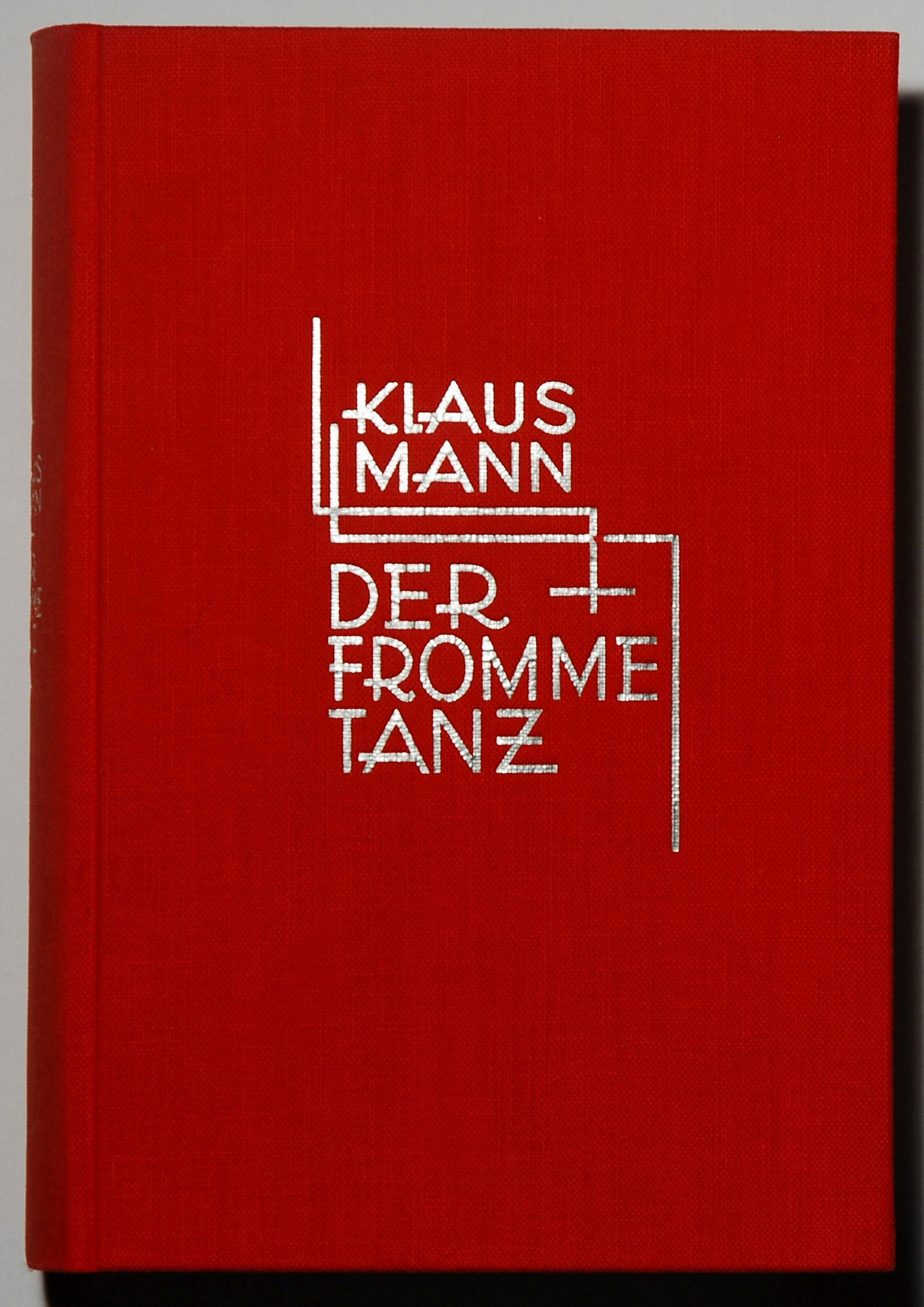 Mann, Klaus: Der fromme Tanz. Das Abenteuerbuch einer Jugend. Hamburg: Enoch 1926 Sammlung H.-P.Haack